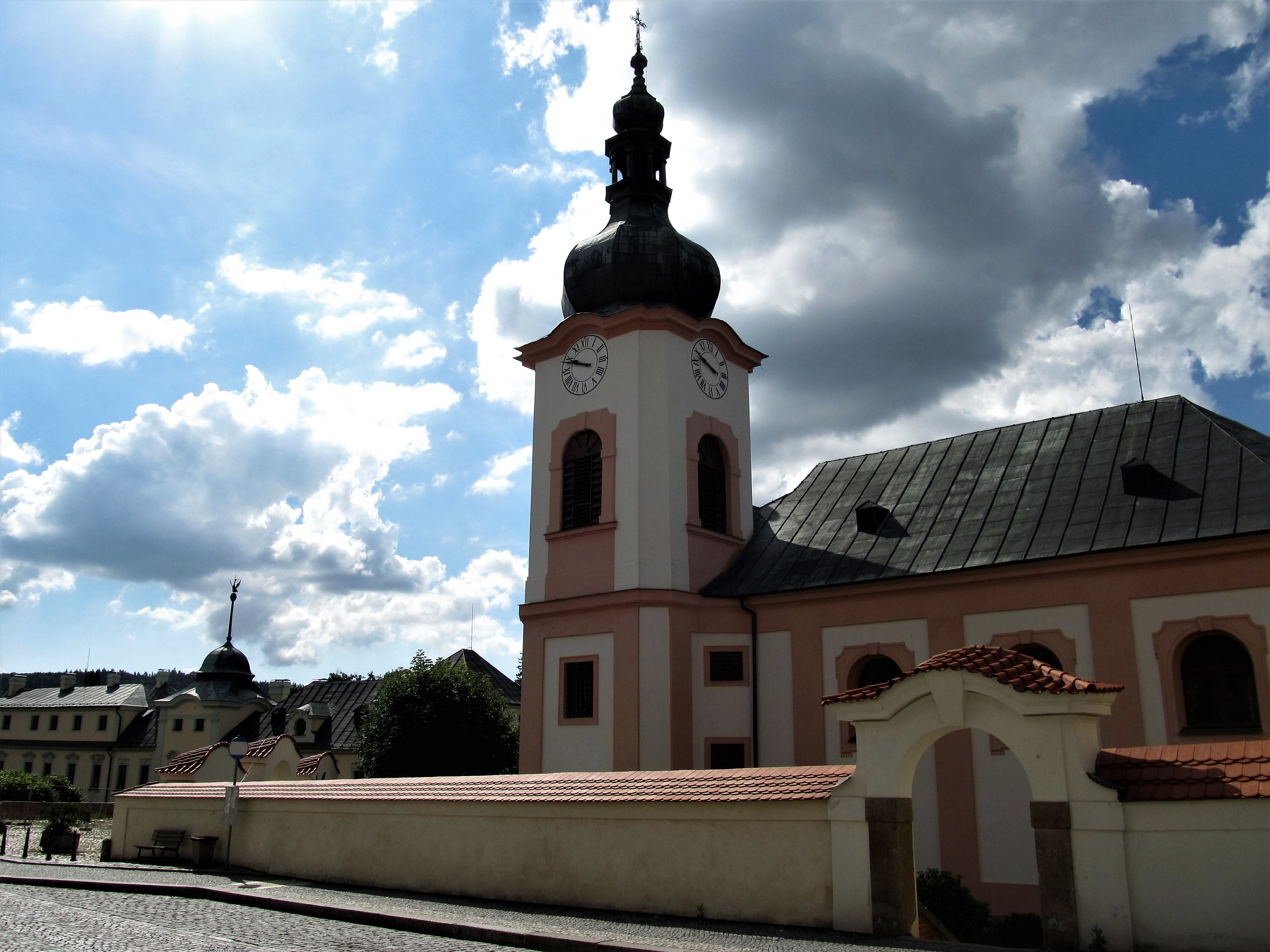 Kostel pohledem ze severní strany náměstí od radnice